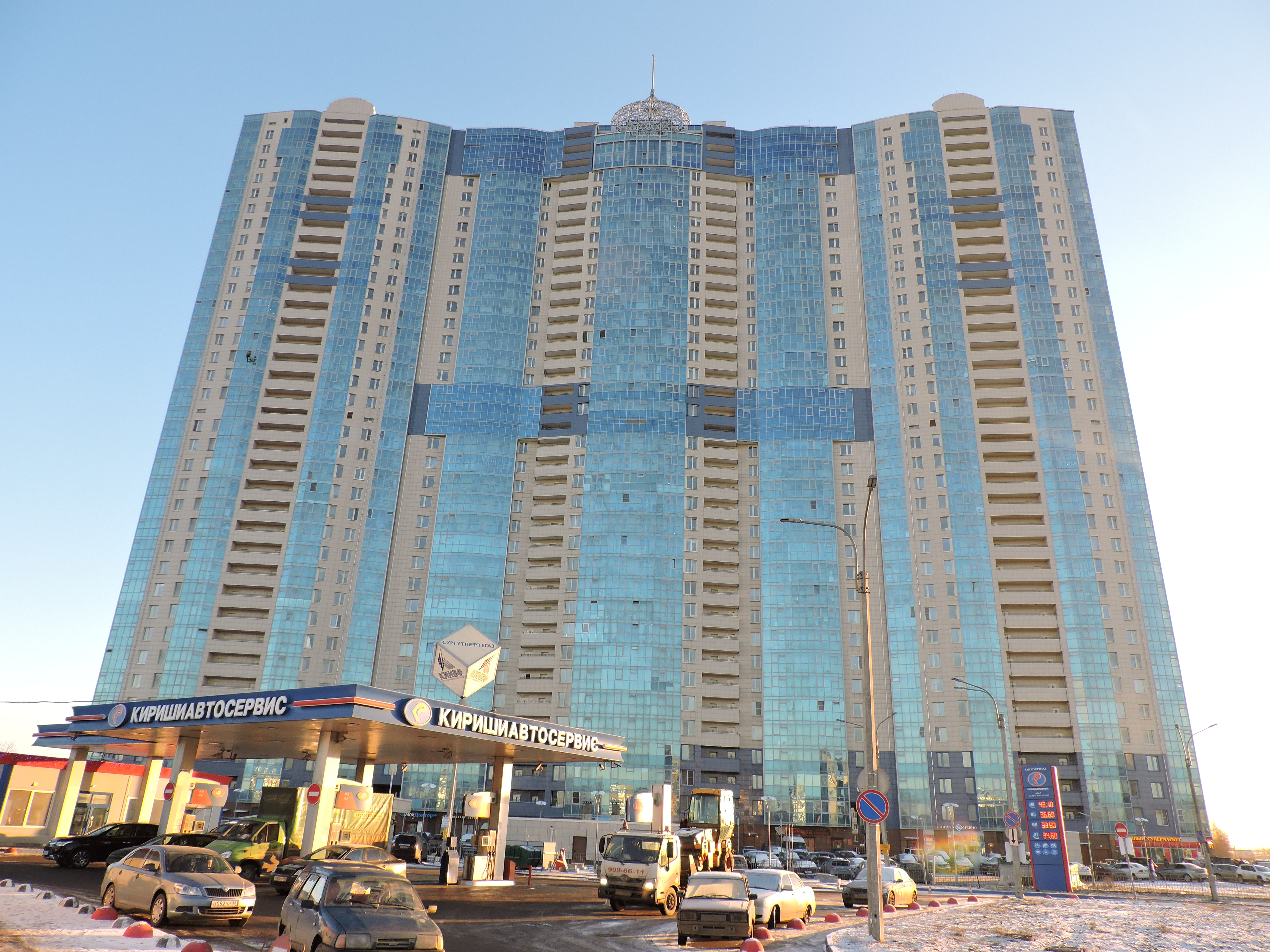 ЖК «Князь Александр Невский»